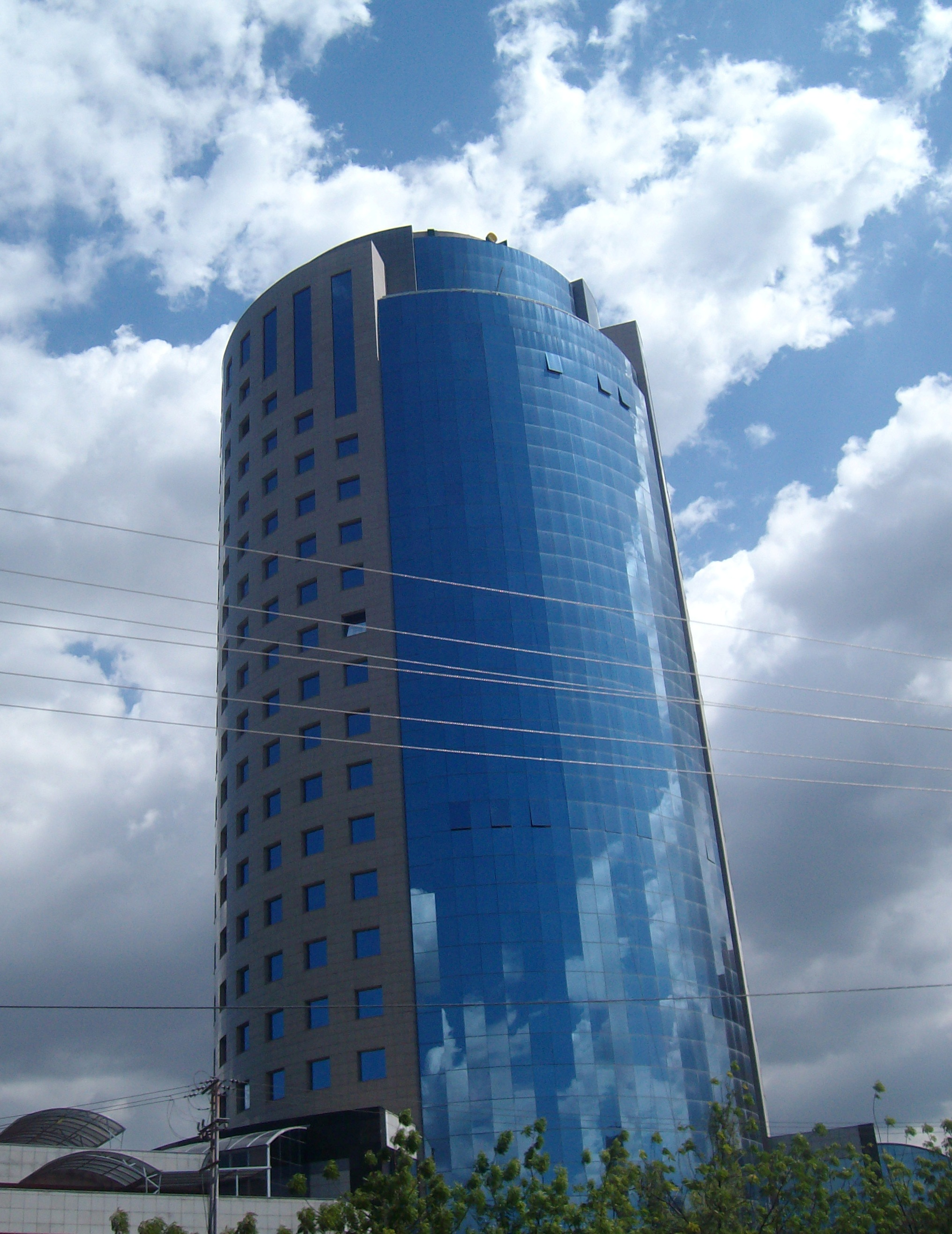 Torre Platinum